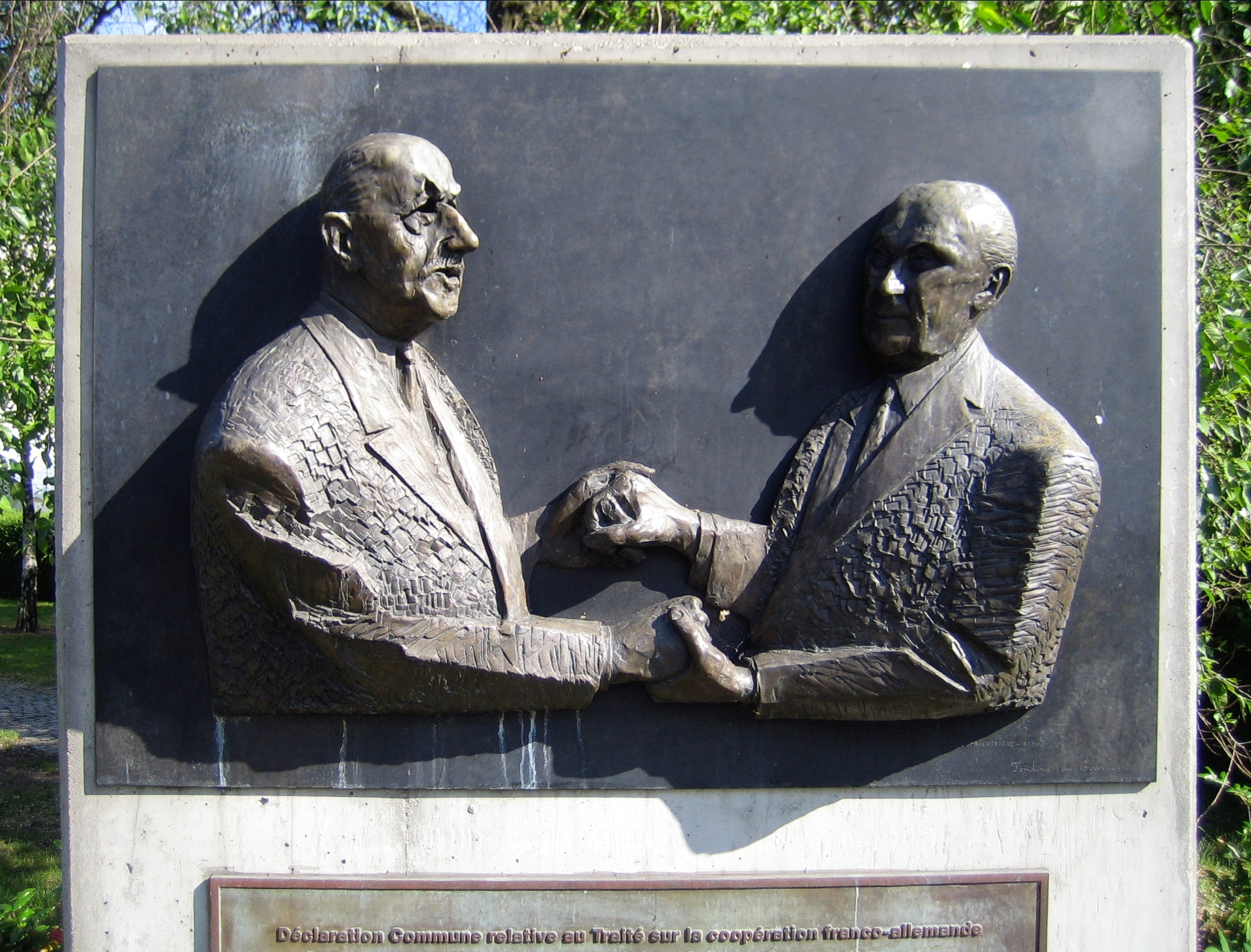 Denkmal zum 40. Jahrestag des Deutsch-Französischen Freundschaftsvertrages vom 22. Januar 1963. Standort: Berlin, Tiergartenstraße 35. Artist: Chantal de la Chauvinière-Riant. Teilansicht.